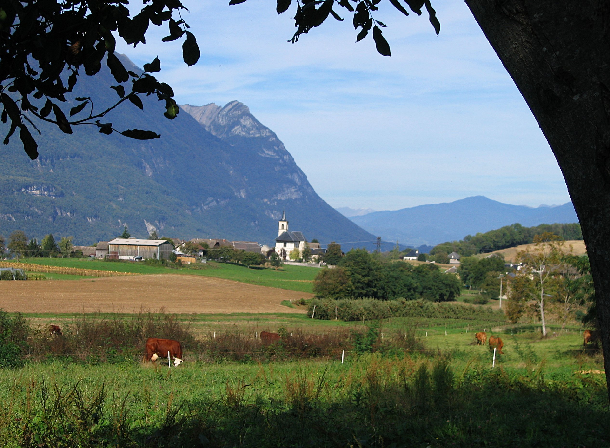 Vue de Chateauneuf depuis Tardevel, à gauche le massif des Bauges